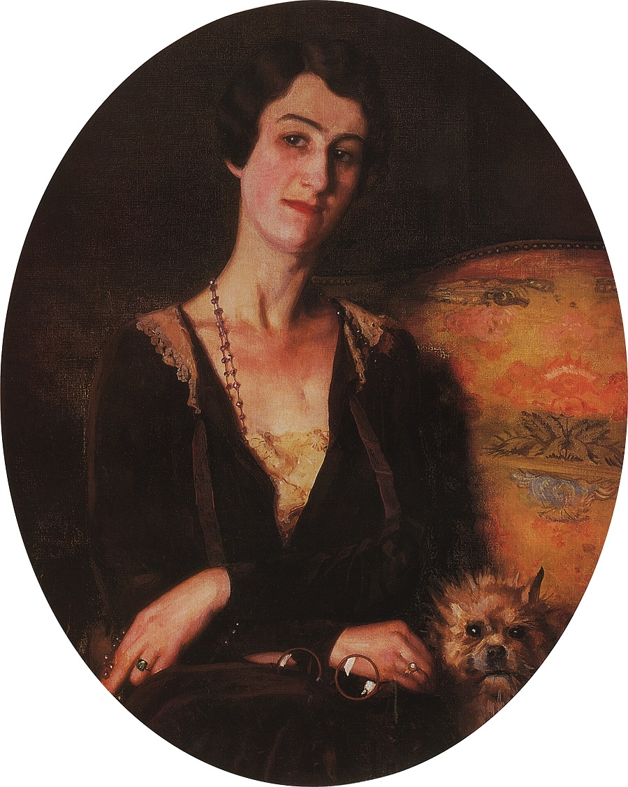 Портрет Е.С.Питс-Билибиной Попова (в замужестве Питс) Елена Сергеевна (1891-1974) - художница; в 1910-1915 гг. училась в Школе ИОПХ; работала на Петроградском фарфоровом заводе; в предреволюционные годы уехала в Англию. Бывшая жена И. Билибина. Питтс - Joseph Pitts, Mirsky's bank manager in Paris[1] Из письма К. Сомова: Париж, 15 февраля 1926 г. "Пришел другой заказ, масляный портрет. М-м Питтс — она была прежде Билибиной,— очень милой и умной дамы. Сначала она хотела заказать мне портрет с головы цветными карандашами муж ее сказал, что уж раз заказывать портрет, то лучше маслом и большой. Он богатый банкир. Похож на Черномора, но довольно симпатичный и культурный, любит искусство и книги. И собирает старину, мы вместе обсуждали позу и костюм. Она, как манекен в модном доме, переодевалась 5 раз, и я выбрал закрытое бархатное платье цвета lie de vin (винный — по-французски). На старинной бержерке (кресло — по-французски), обитой желтым с узорами штофом. Она так близорука, что носит очки себя ими очень портит. Предложил их держать в руках, чему она очень обрадовалась".